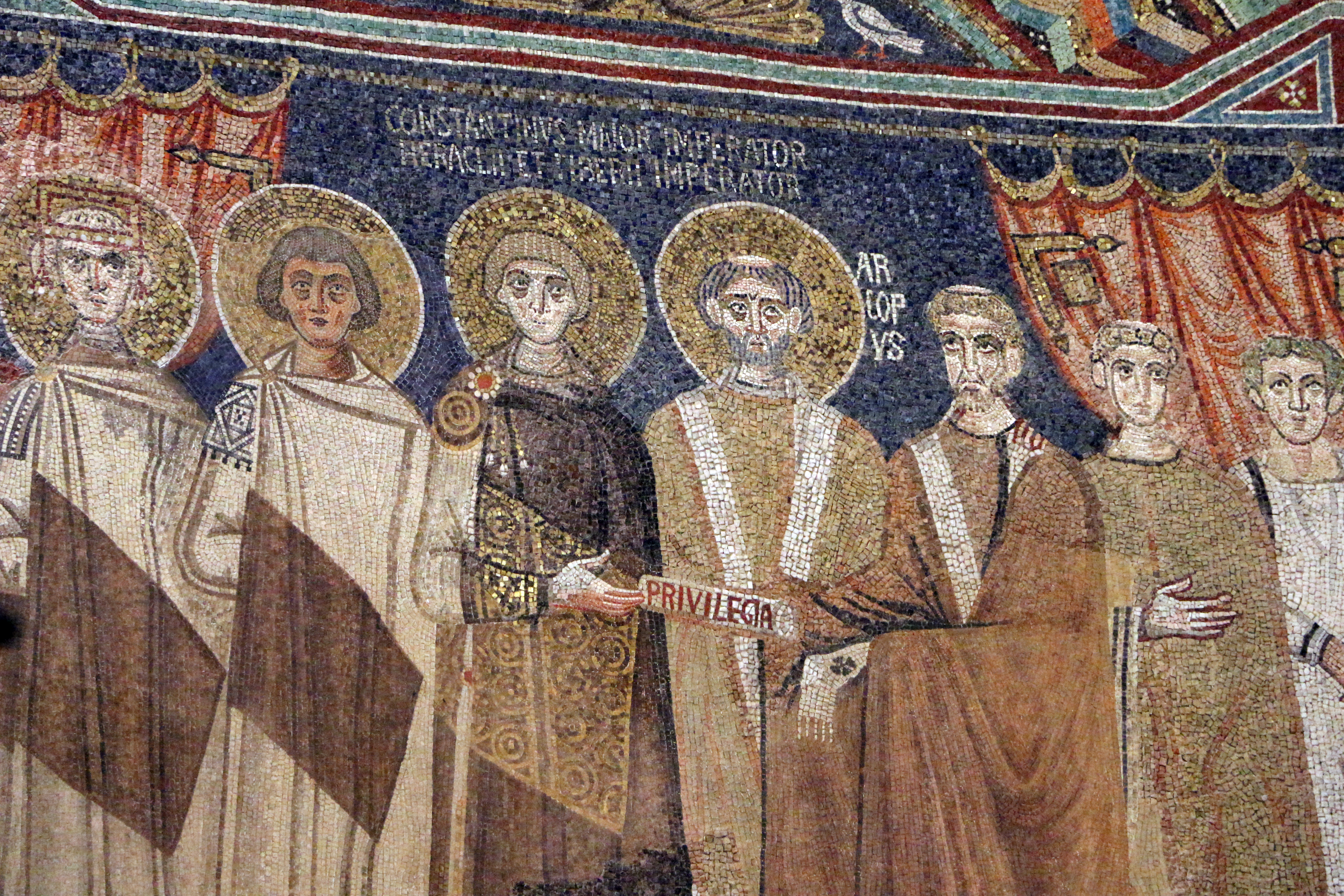 Basilica di Sant'Apollinare in Classe This is a photo of a monument which is part of cultural heritage of Italy.